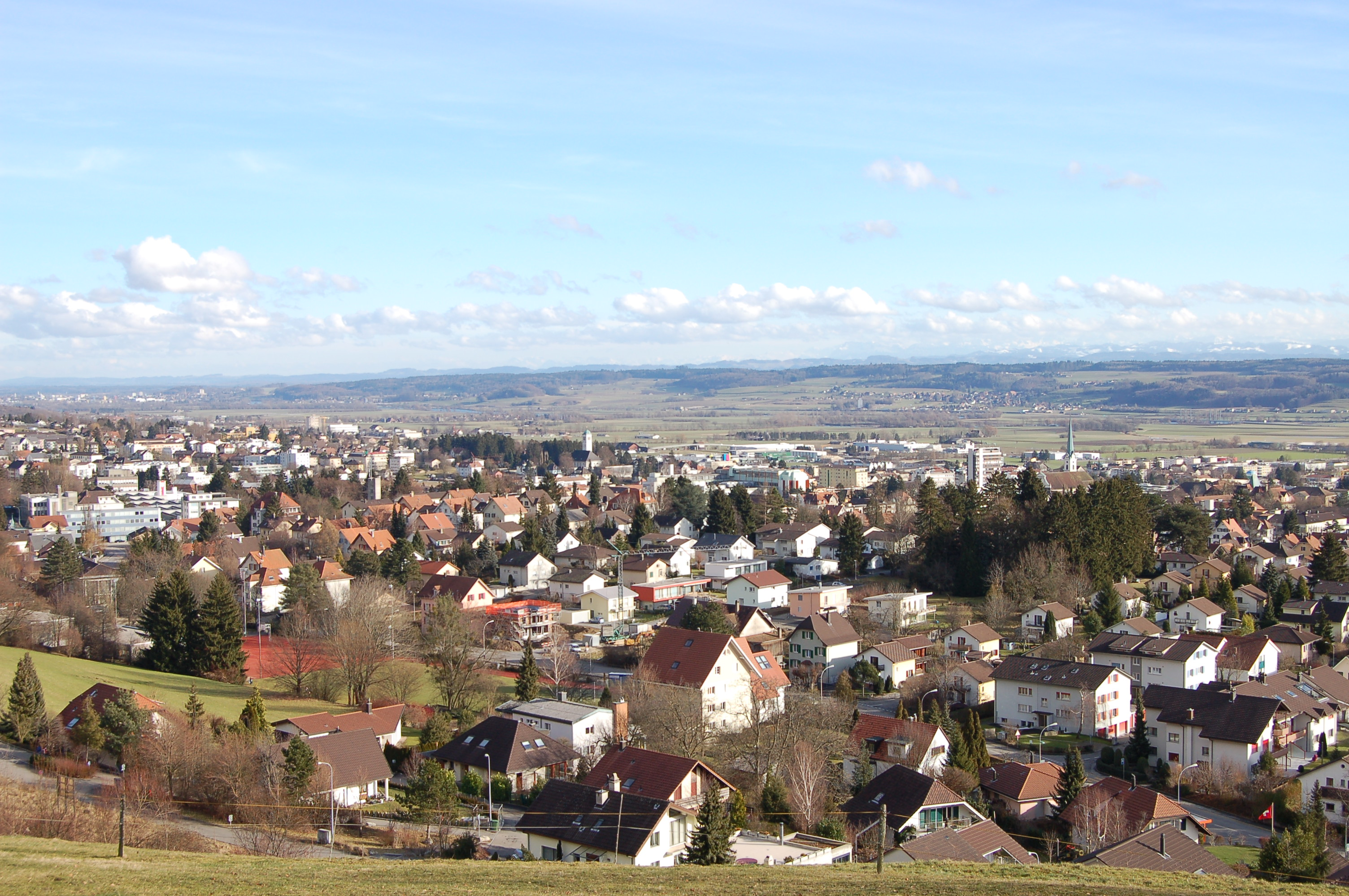 Sitz der Verwaltung und Stadtpräsidium, Grenchen Süd